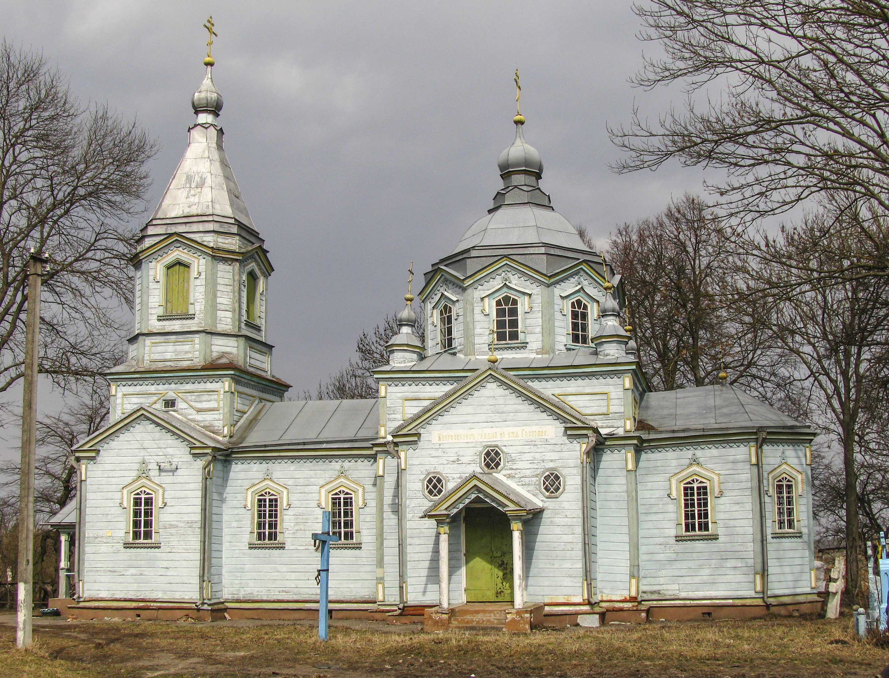 Ярославичі, Млинівський район, церква Різдва Богородиці, 1882 р.